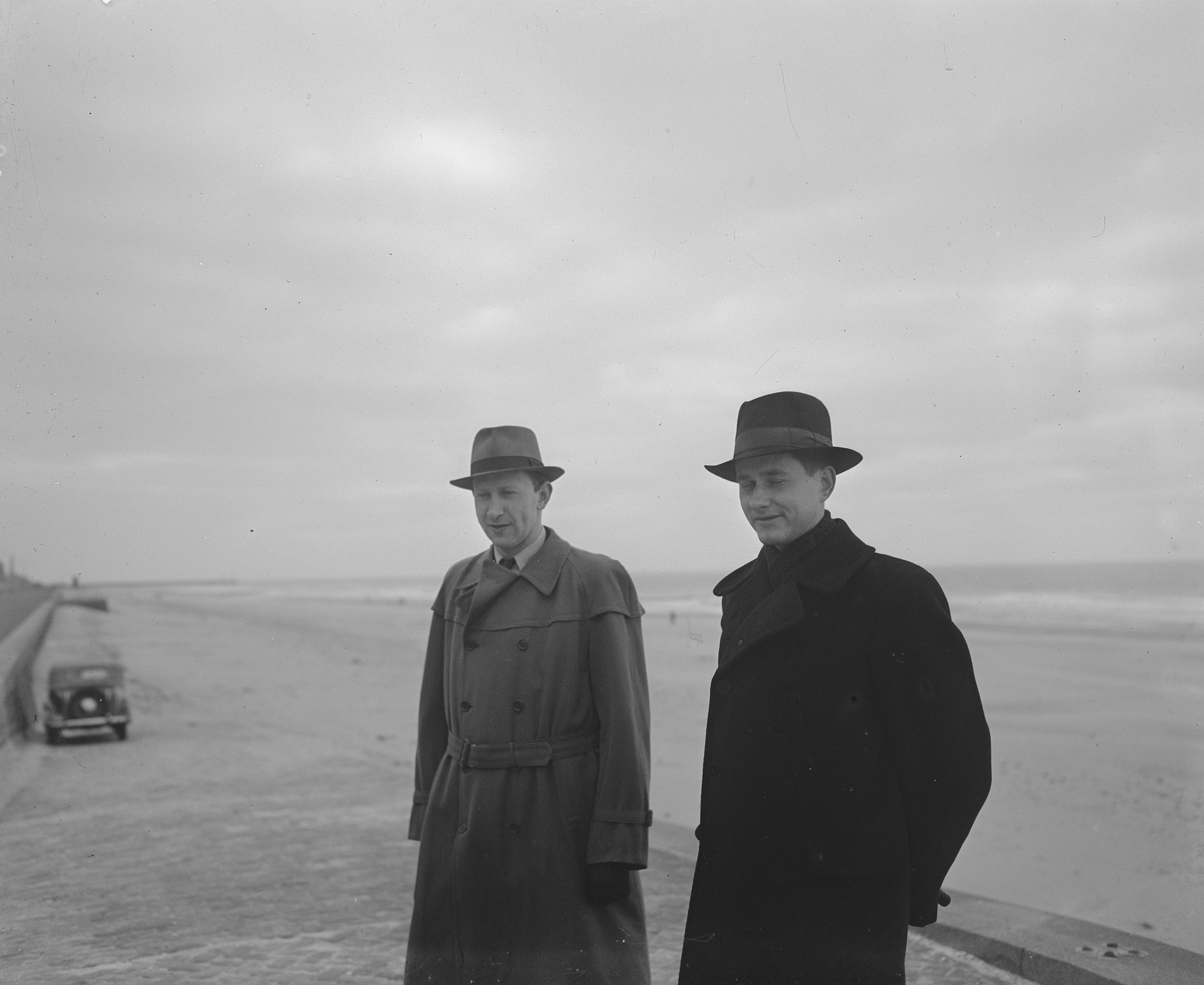 Collectie / Archief : Fotocollectie Anefo Reportage / Serie : [ onbekend ] Beschrijving : Wereldkampioenschappen schaken te Den Haag. Keres (rechts) en Smyslow aan strand Datum : 23 februari 1948 Locatie : Scheveningen Trefwoorden : schaken, stranden Persoonsnaam : Keres, Paul, Smyslov, Vassili Fotograaf : Snikkers, […] / Anefo Auteursrechthebbende : Nationaal Archief Materiaalsoort : Glasnegatief Nummer archiefinventaris : bekijk toegang 2.24.01.09 Bestanddeelnummer : 902-5988